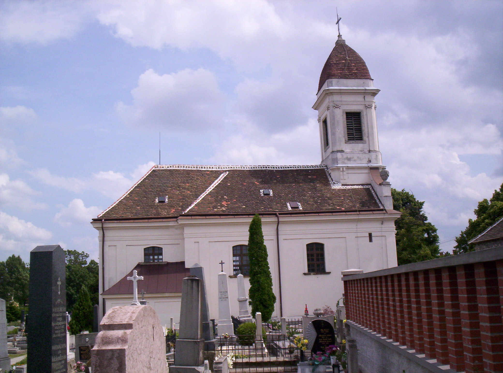 Calvary Church in Pápa, Hungary A pápai Fájdalmas Anya Kálvária-templom